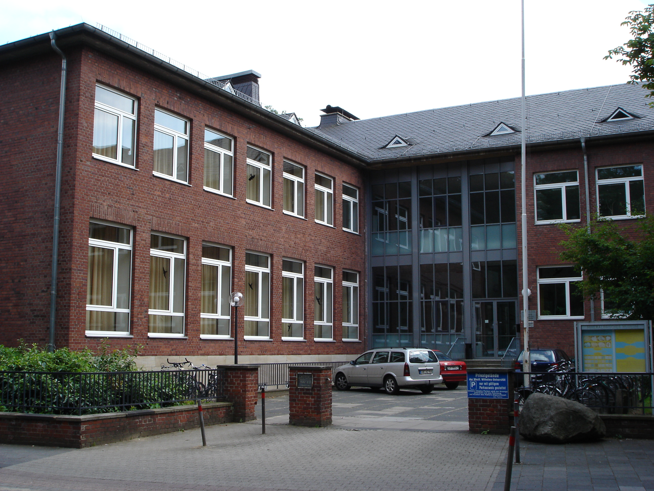 Ehemaliges Mineralogisches Museum in Münster, Westfalen, Germany